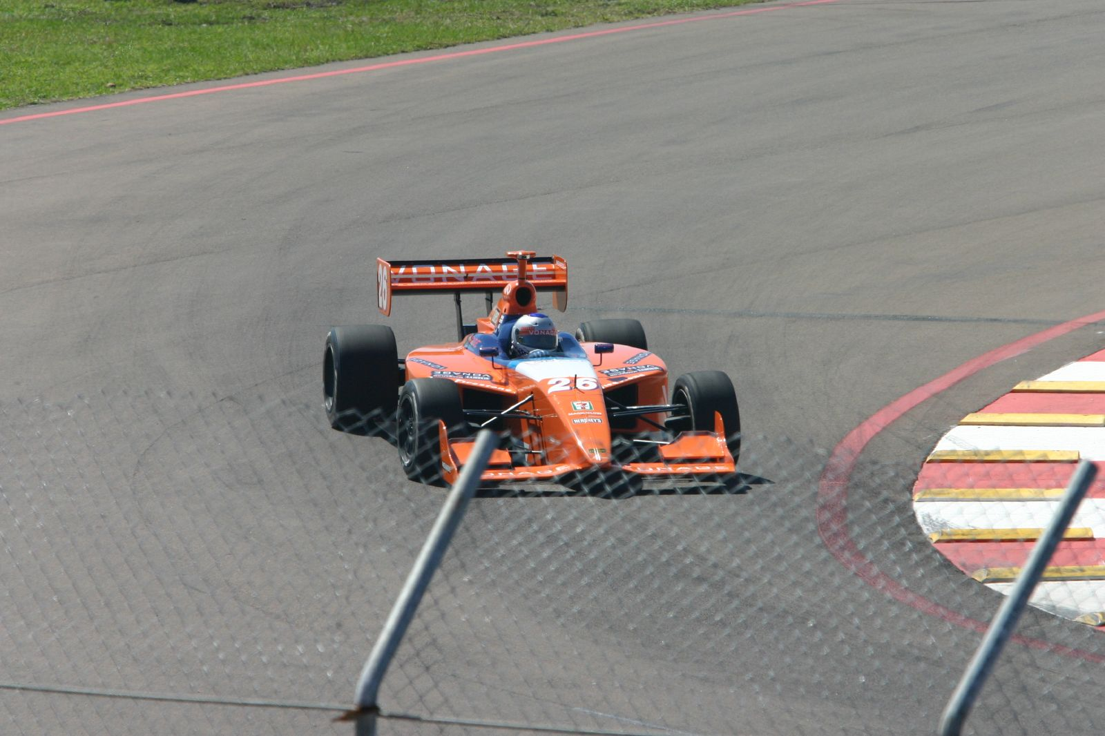 Marco Andretti driving an Infiniti Pro Series car in 2005.